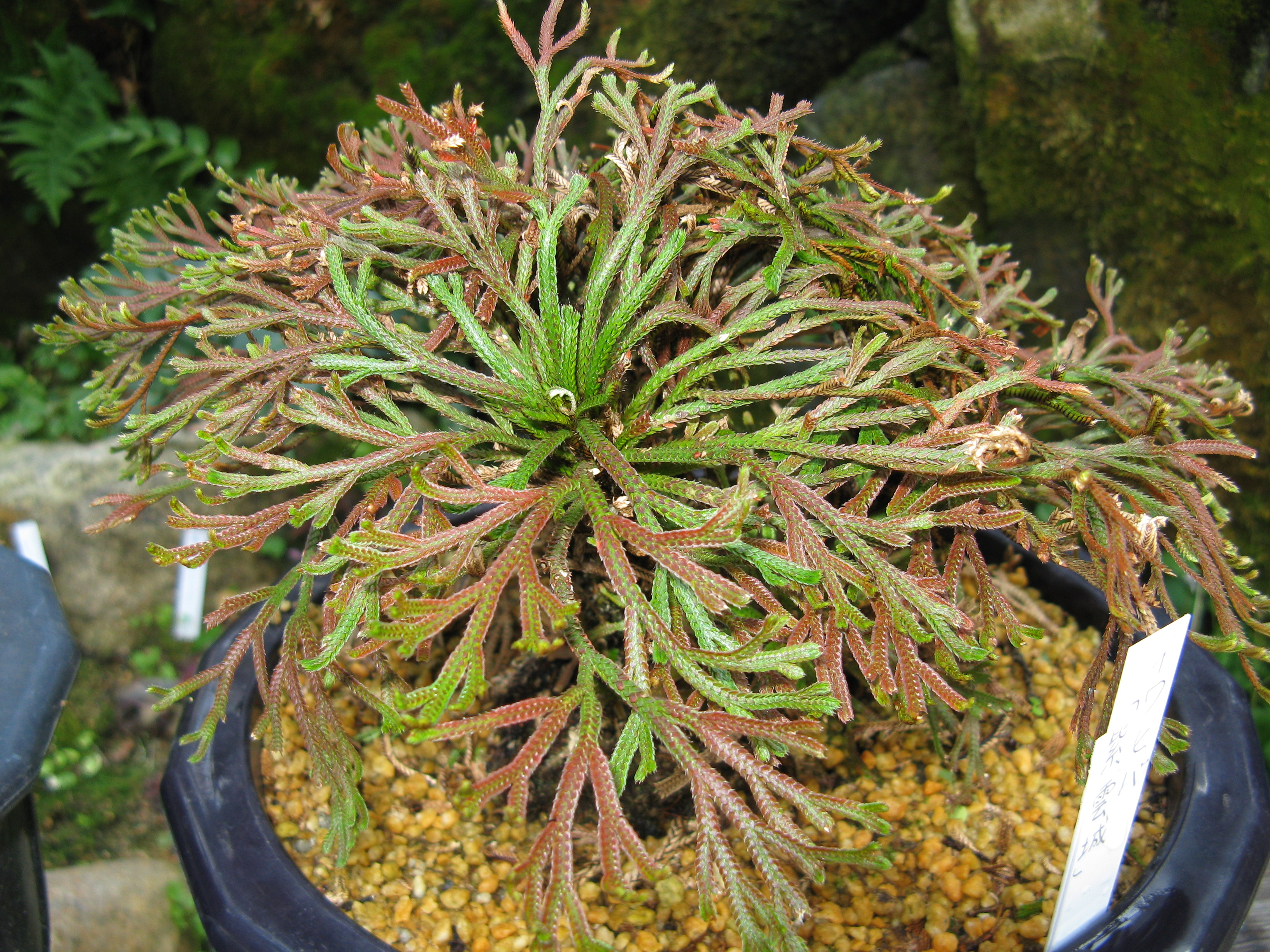 Selaginella tamariscina Cv.